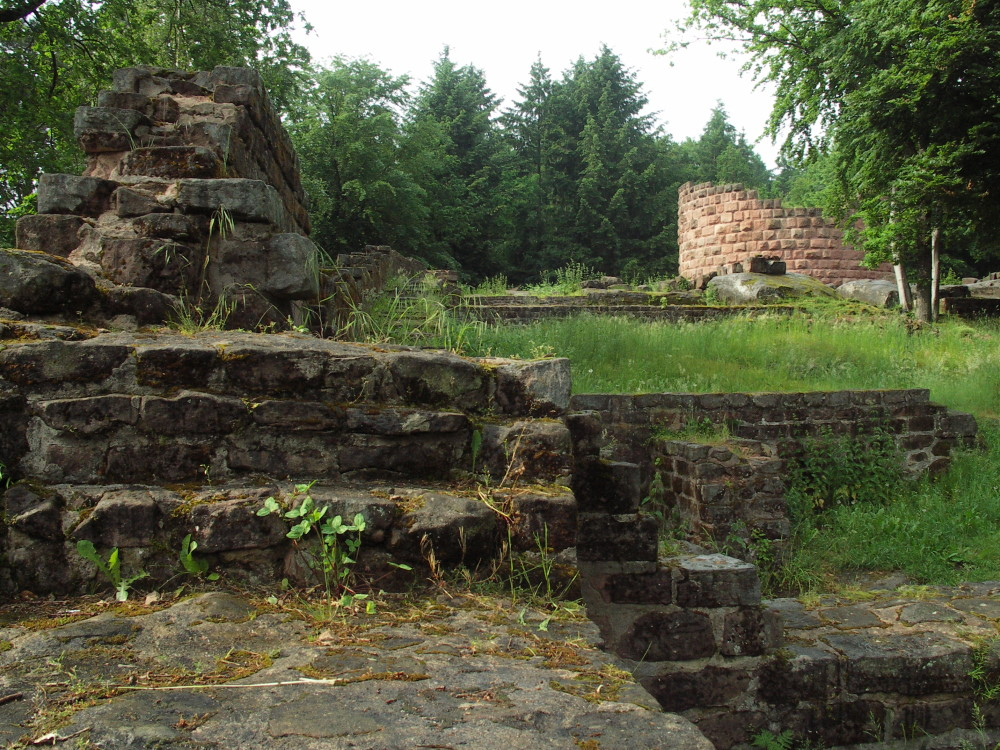 Steinenschloss, Blick über den Eingang von Unterburg zur Oberburg. Im Hintergrund der grosse Rundturm Datum: 29.5.2005 Fotograf: Peter Schmenger